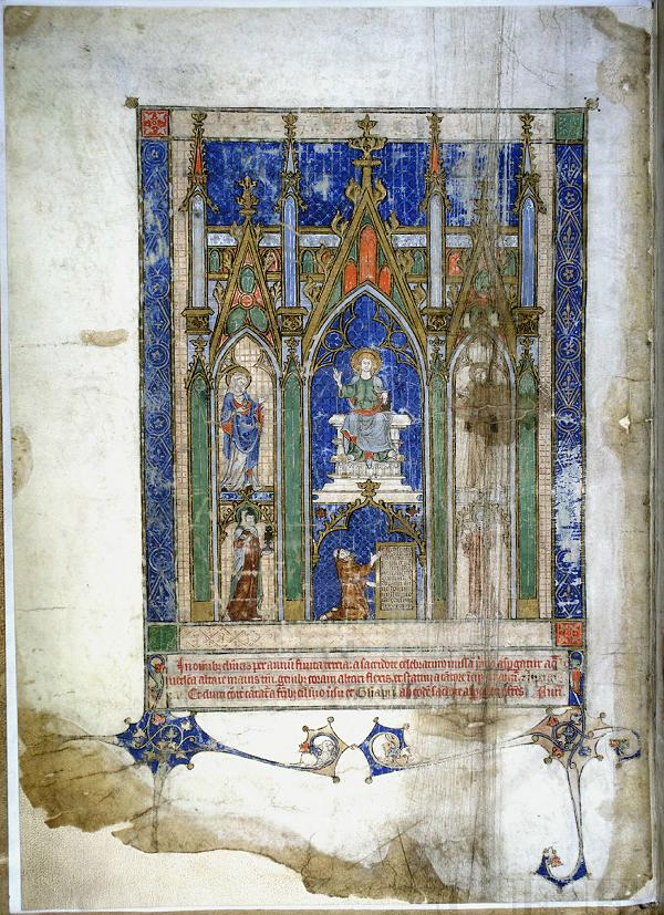 Graduel de Cologne Dédicace 1v